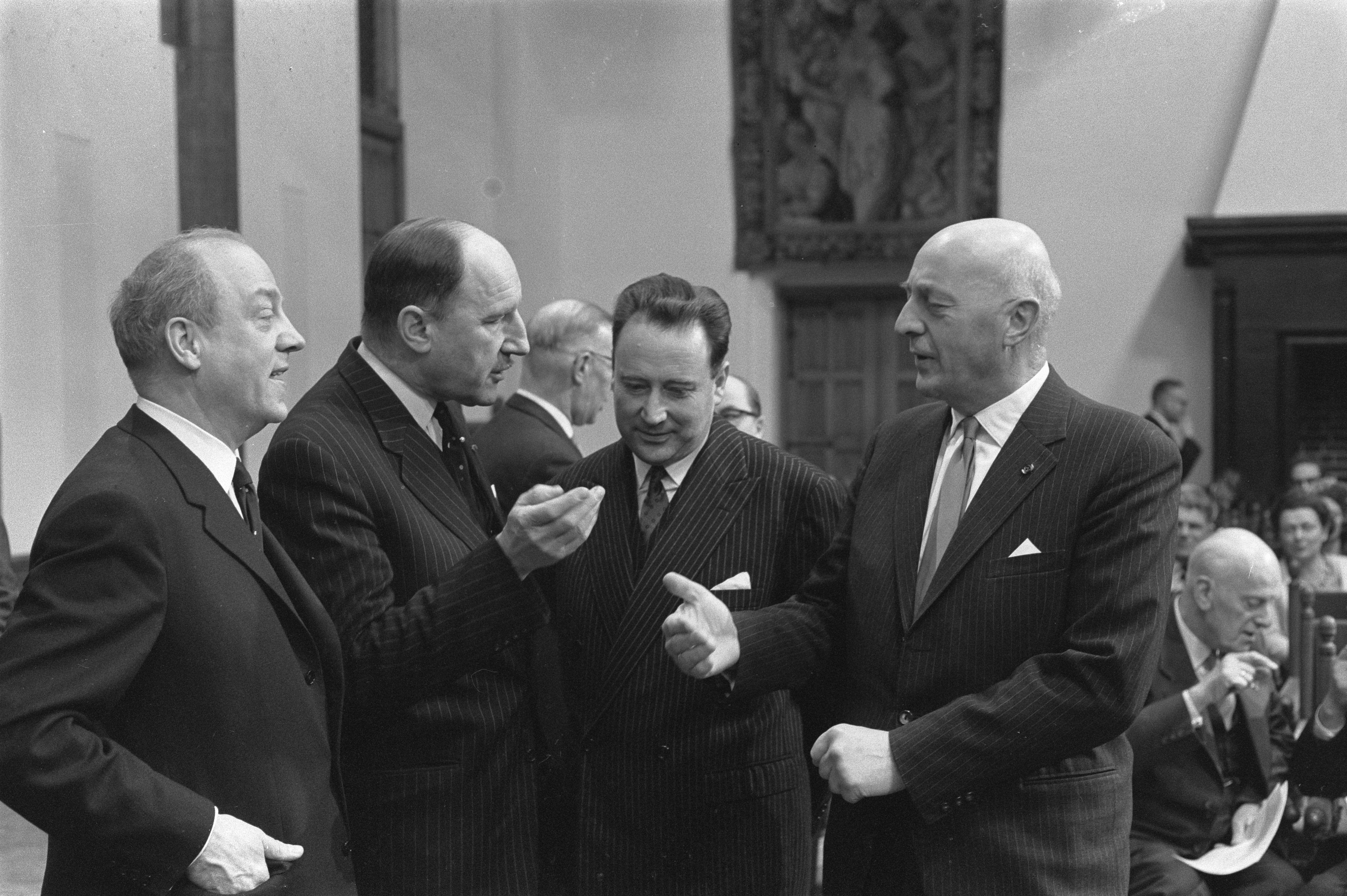 Collectie / Archief : Fotocollectie Anefo Reportage / Serie : [ onbekend ] Beschrijving : Europese manifestatie in Ridderzaal te Den Haag gehoude v.l.n.r. dr. K. Birrenbach , minister Luns , Maurice Faure, dr. S. L. Mansholt Datum : 22 februari 1963 Locatie : Den Haag, Zuid-Holland Trefwoorden : manifestaties Persoonsnaam : Dr. K. Birrenbach, Dr. S. L. Mansholt, Luns, J.A.M.H., Luns, Joseph, R. T. Hon Instellingsnaam : Ridderzaal Fotograaf : Pot, Harry / Anefo Auteursrechthebbende : Nationaal Archief Materiaalsoort : Negatief (zwart/wit) Nummer archiefinventaris : bekijk toegang 2.24.01.05 Bestanddeelnummer : 914-8542